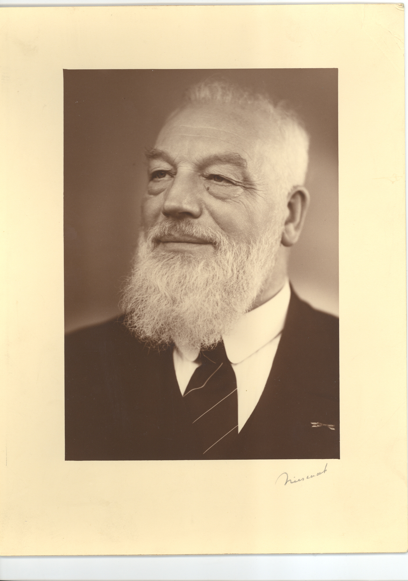 Foto uit familiebezit